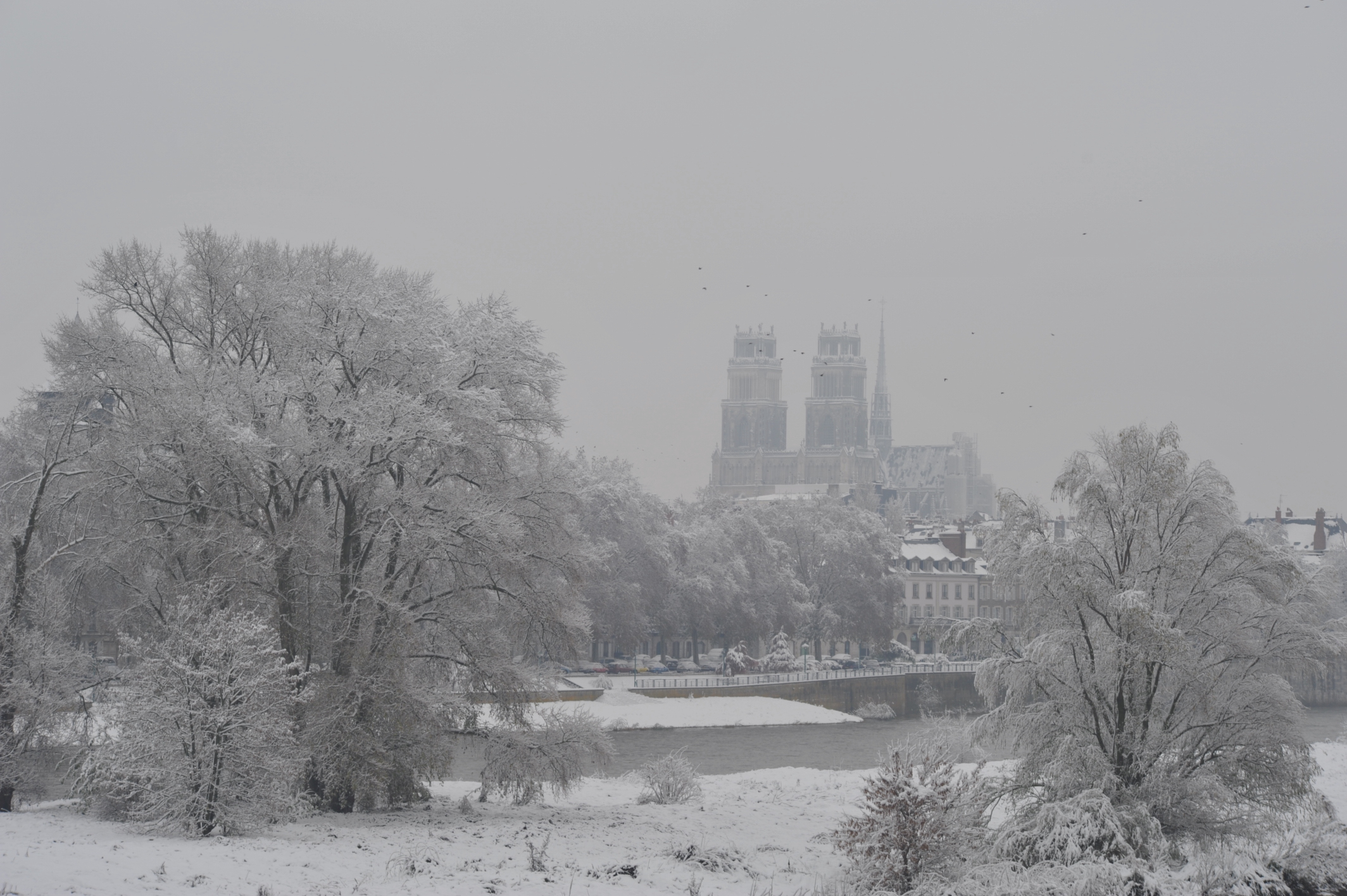 Paysage de neige sur les bords de Loire, Orléans, Loiret, France